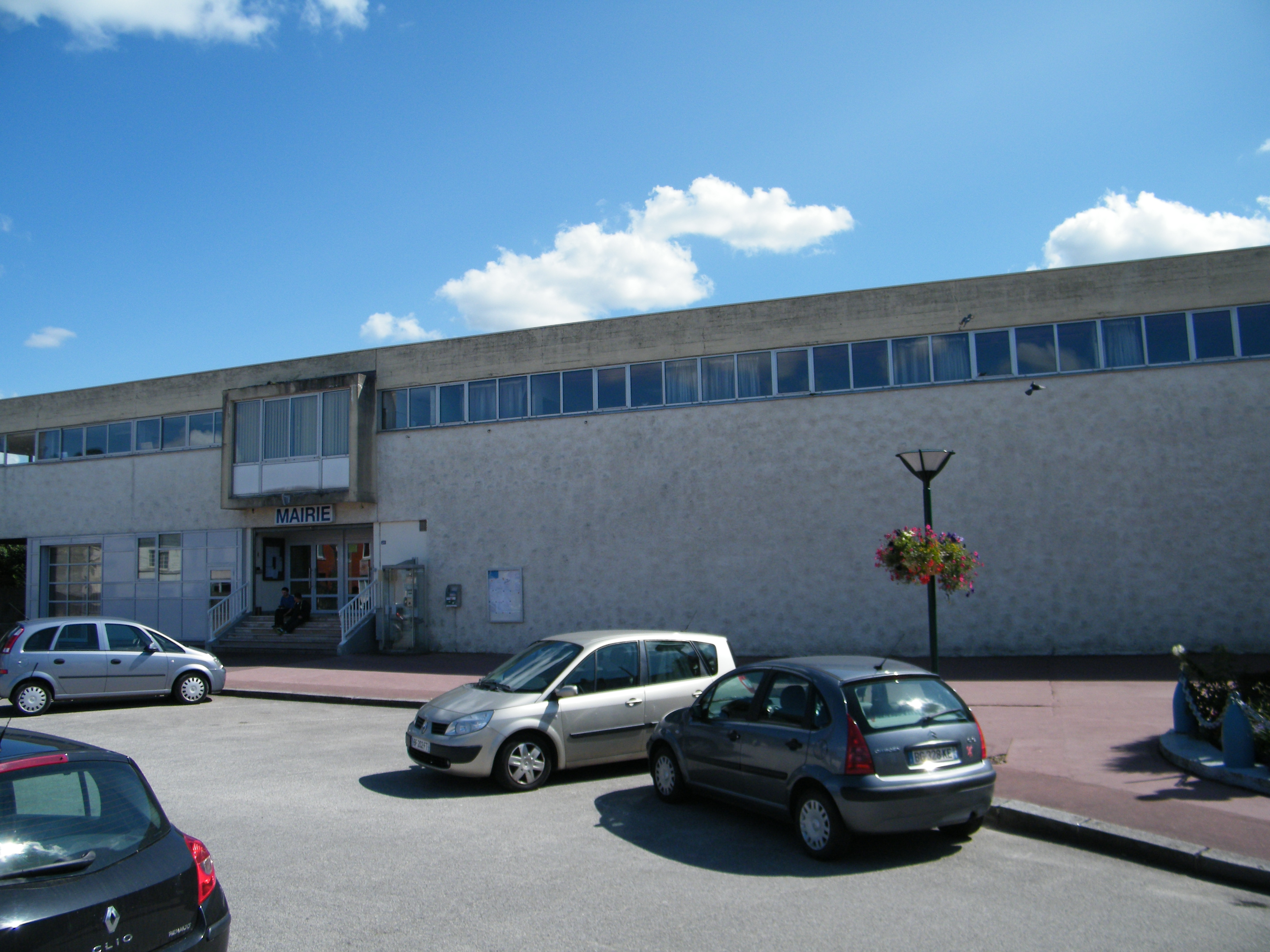 Foucarmont, Seine-Maritime, France, mairie